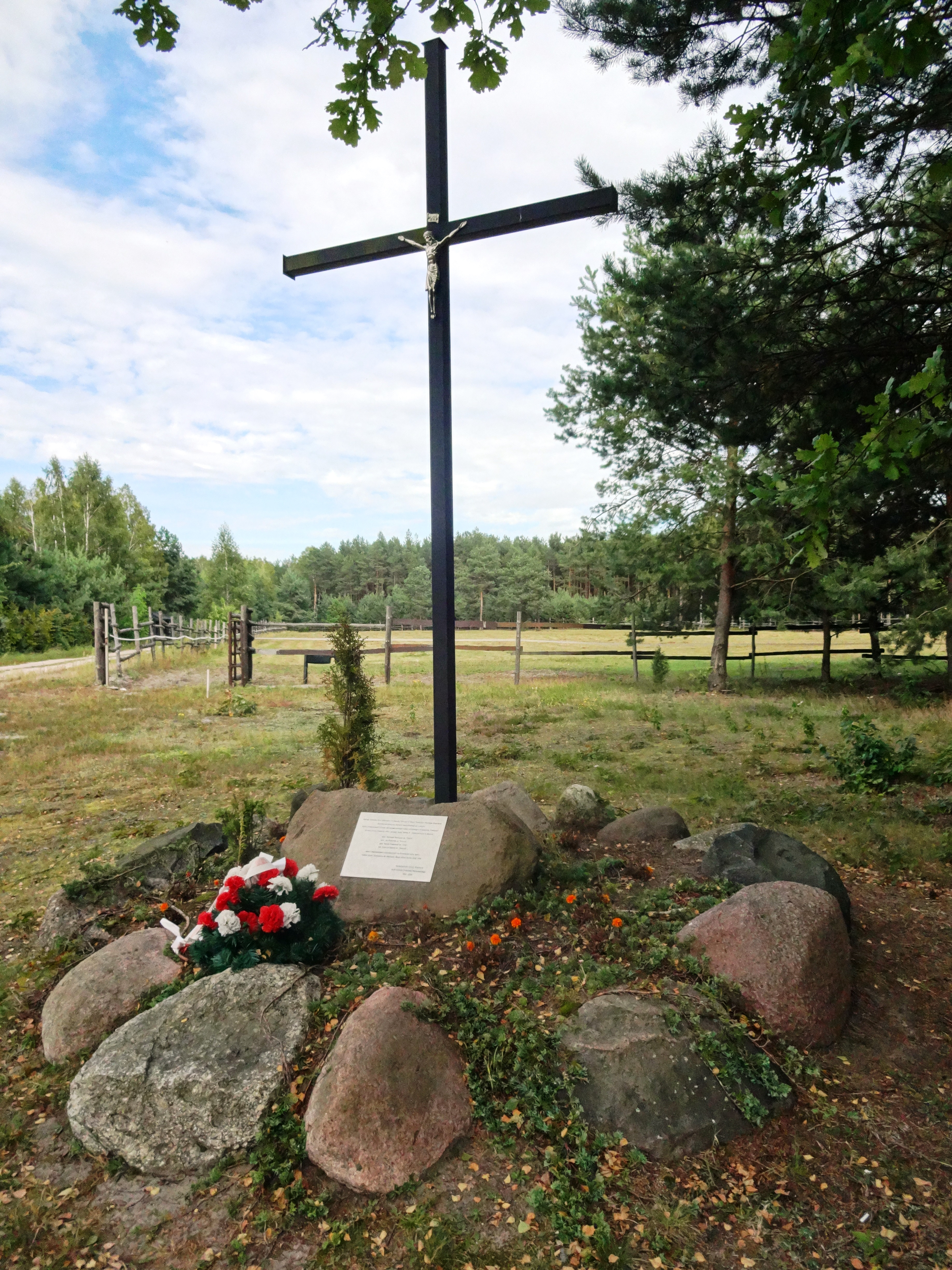 Pamiątkowy krzyż na zrzutowisku